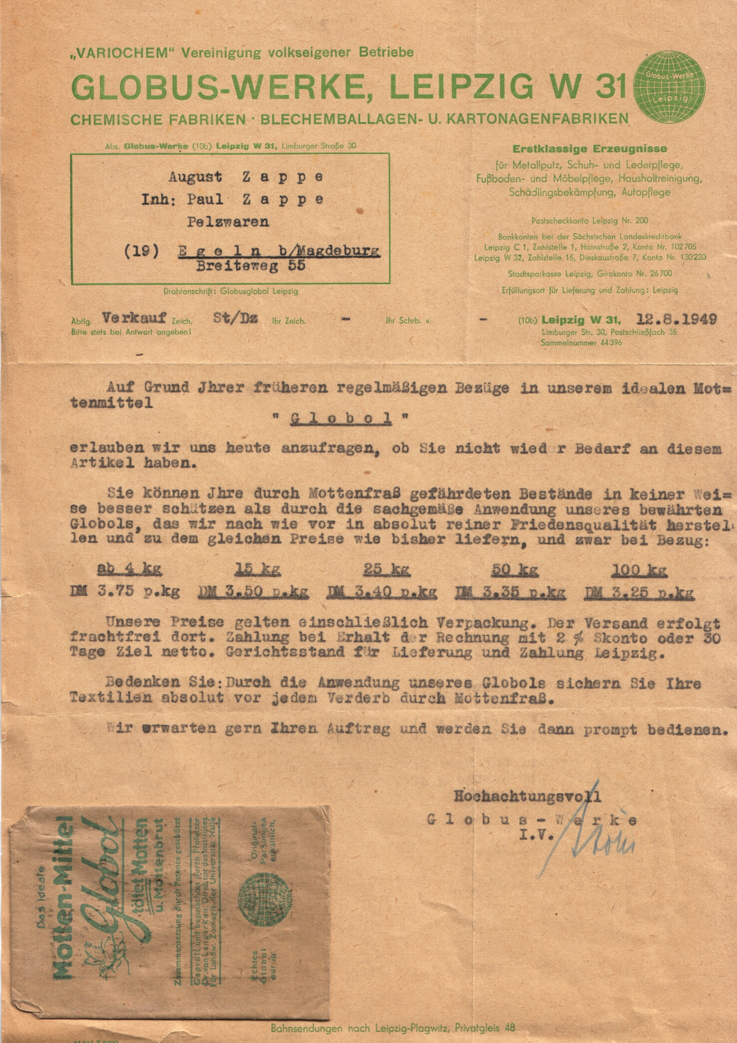 Werbebrief des jetzt "„Volkseigenen“ Betriebes Globus-Werke, „Variochem“ Vereinigung volkseigener Betriebe, Leipzig W 31, Chemische Fabriken, Blechemballagen- u. Kartonfabriken, Limburger Straße 30 an die Firma Pelzwaren August Zappe, Inh. Paul Zappe, (19) Egeln b/Magdeburg, Breiteweg 55 für das, offenbar schon vor Ende des 2. Weltkriegs bezogene Mottenmittel „Globol“. Es lag bei ein Tütchen Mottenmittel (mit abgebildet) sowie ein ausgestanztes Faltblättchen, ein Abschied nehmendes Mottenpärchen abbildend, Leb' wohl man nimmt Globol, innen Produktbeschreibung.